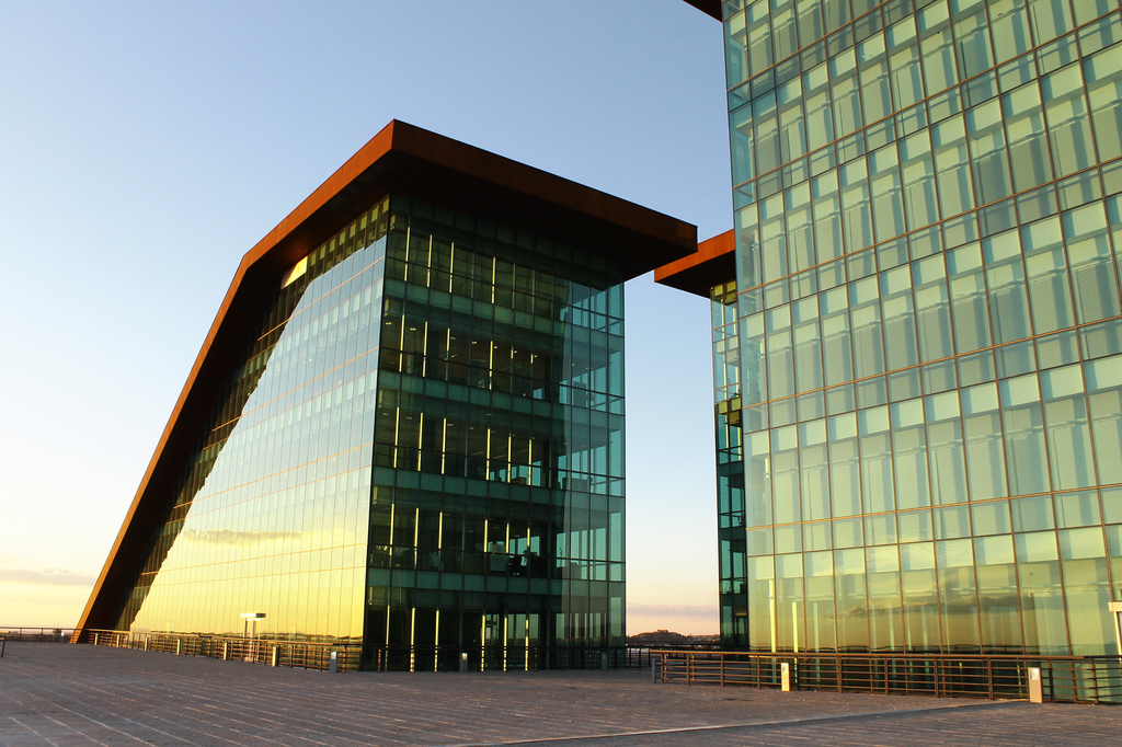 Edificio de desentralizacion administrativa en la capital de la ciudad de San Luis (Argentina).